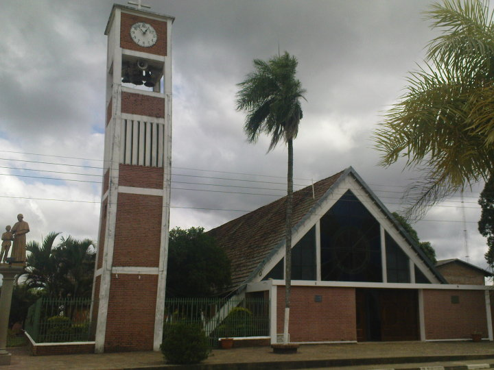 Frontis de la Iglesia de San Carlos Borromeo - Santa Cruz Bolivia